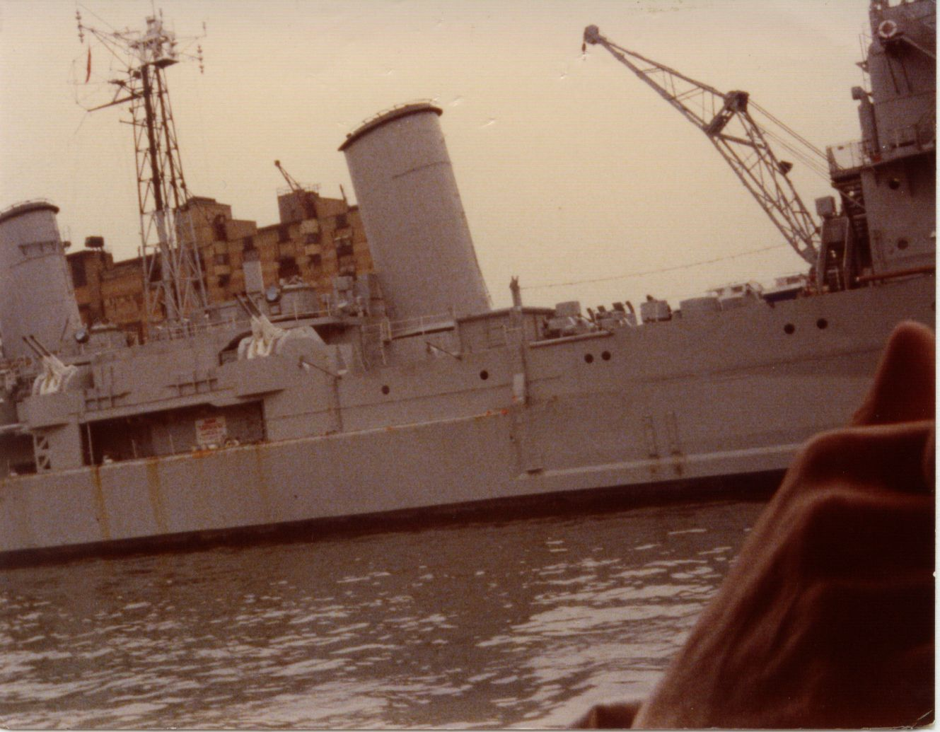 Le Belfast amarré sur la Tamise à Londres